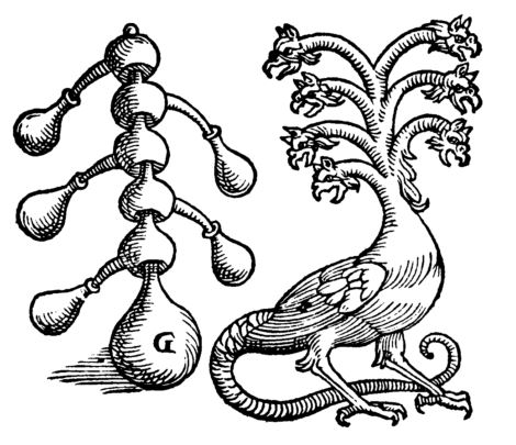 Distillation fractionnée dans une hydre, Della Porta (Distillations 1609)